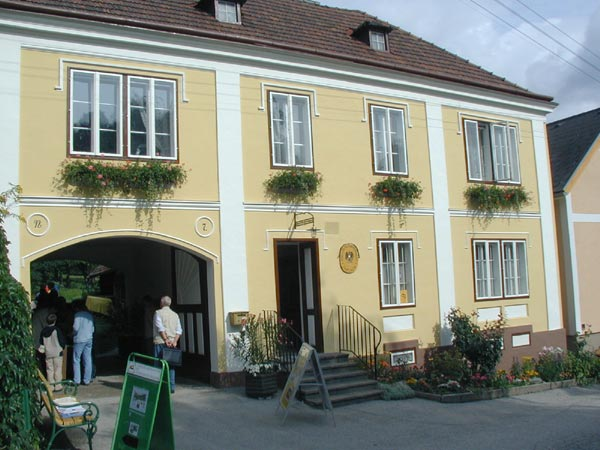 Das historische Postamt in Küb aufgenommen bei der 100-Jahr-Feier am 28. August 2005.